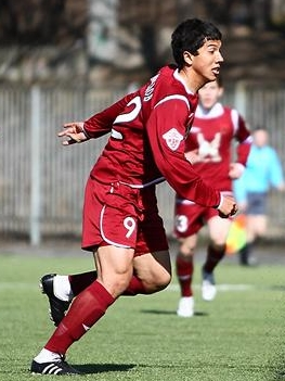 Вахыт Оразсахедов (ФК "Рубин"